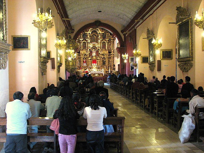 Interior de la catedral de Huancavelica. Licensing